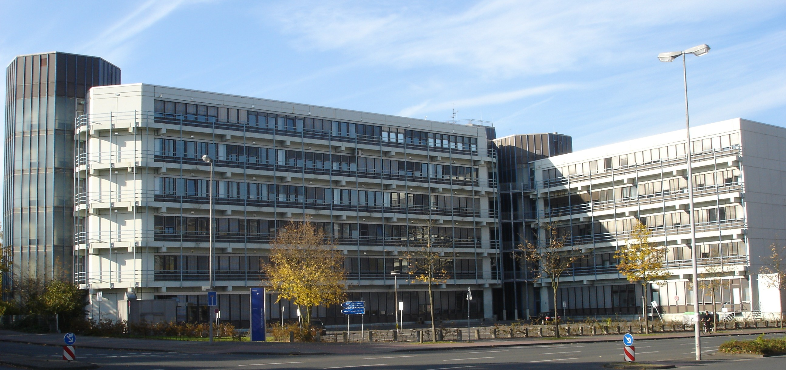 Fachhochschule Muenster (Westphalia), Germany (Frontside)